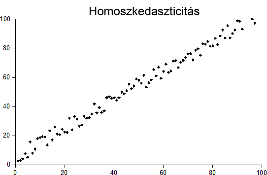 Generált homoszkedasztikus véletlen adatok.